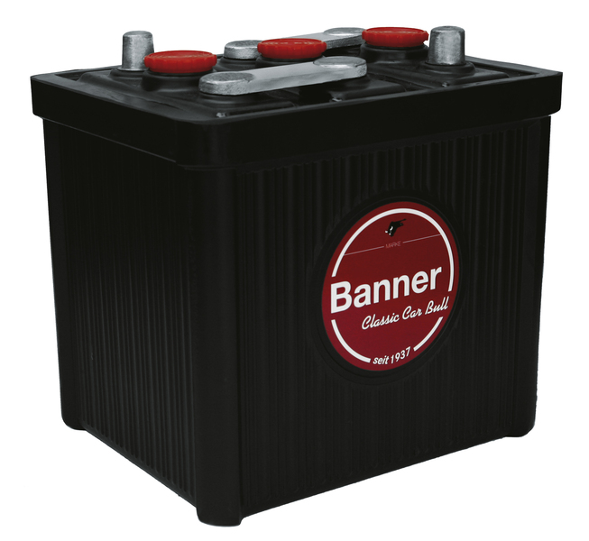 Historische Abbildung einer Batterie